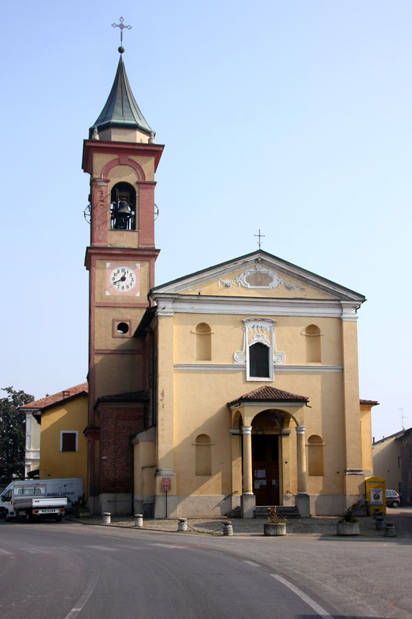 Chiesa parrocchiale di Cameriano, frazione di Casalino (NO)